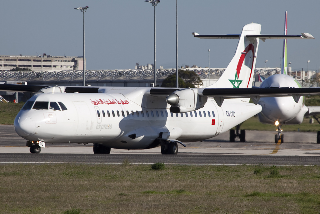 Lisboa